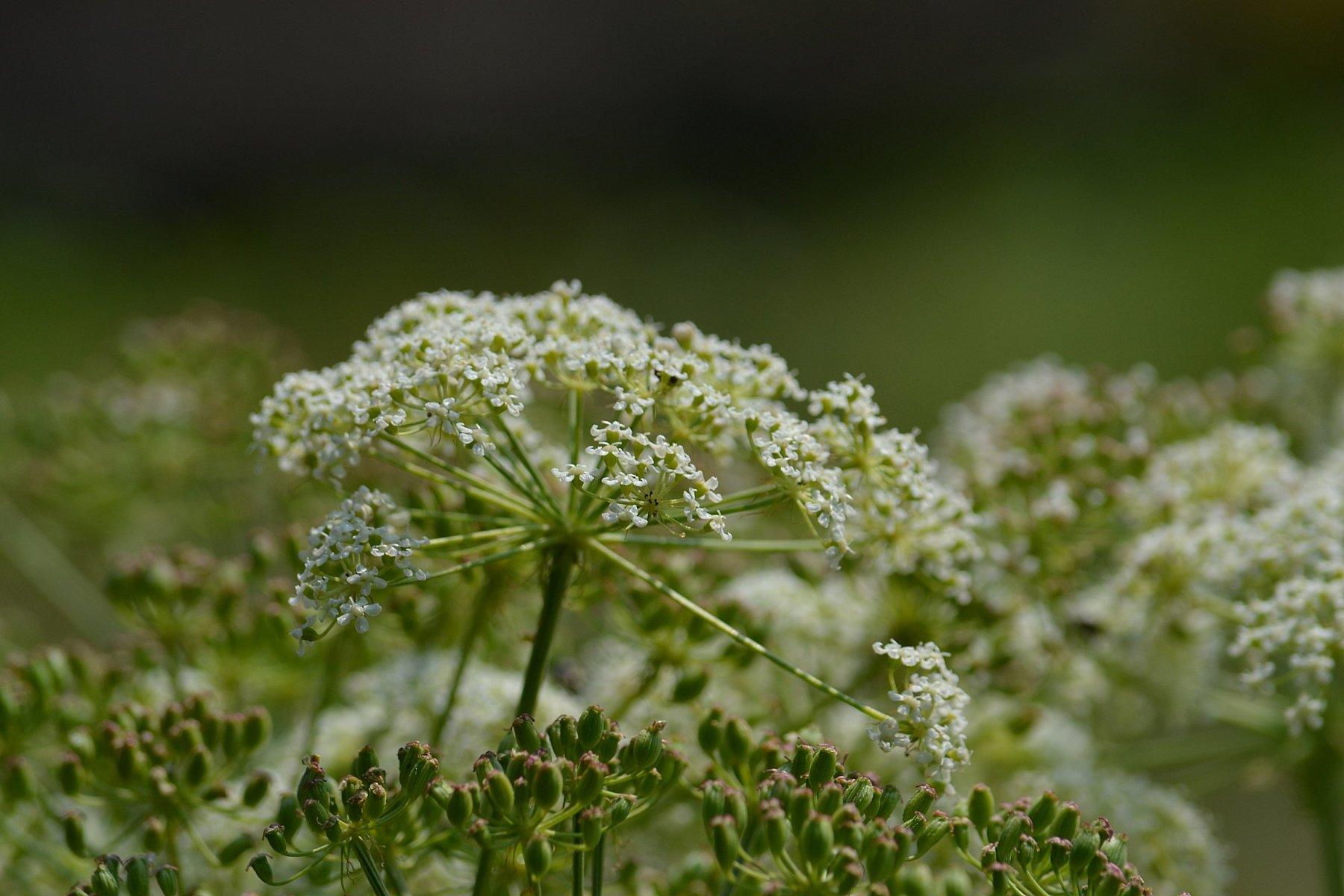 Gorysz siny